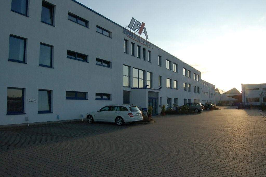 IFA Haldensleben